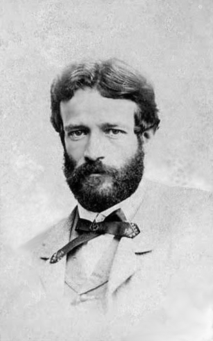 Saro Cucinotta , graveur